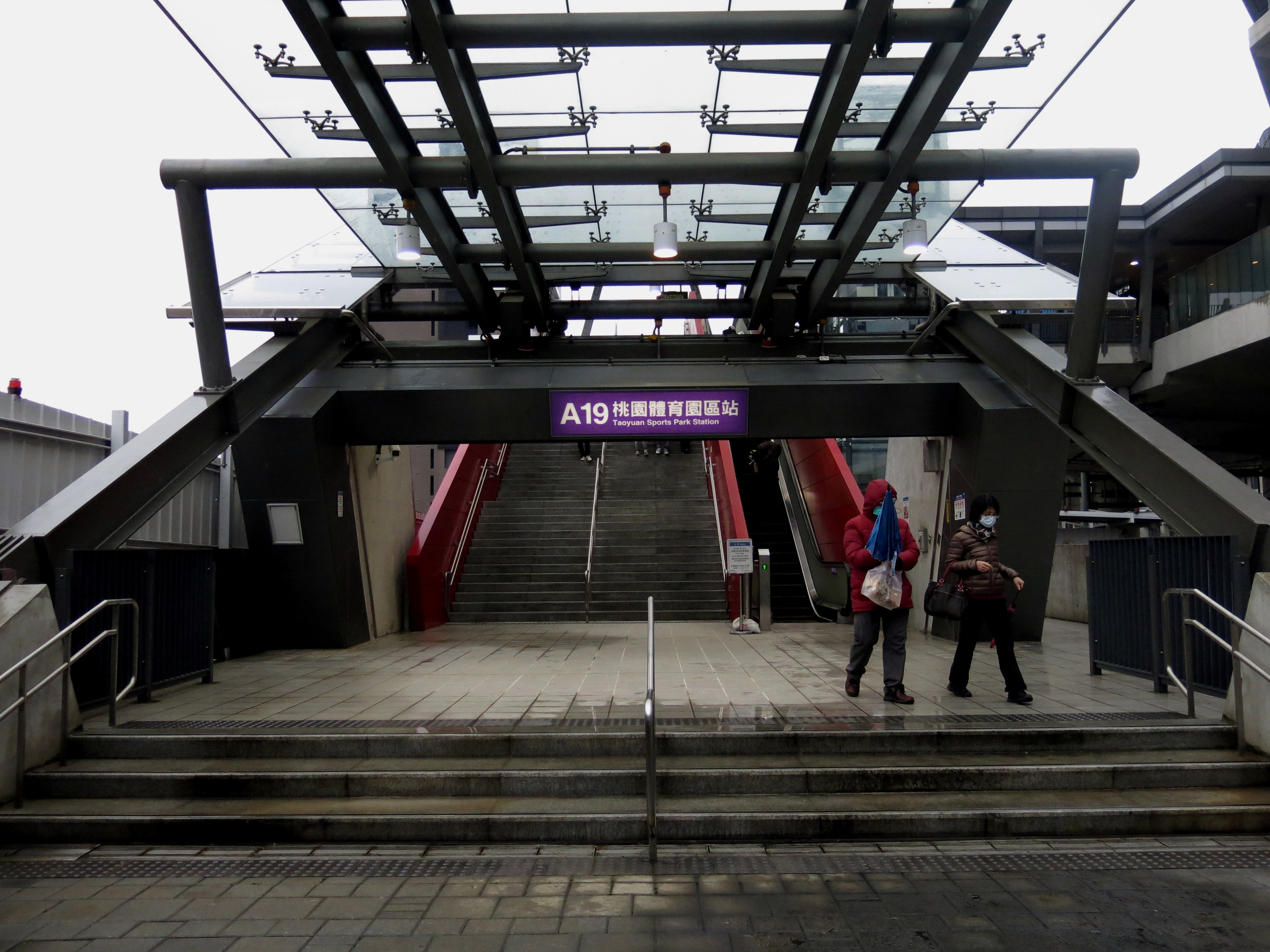 中文（台灣）: 桃園捷運機場線A19桃園體育園區站